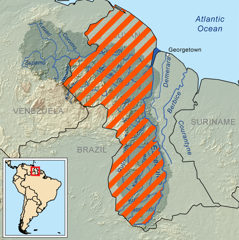 Mapa de la Guayana Esequiba; la zona rayada en naranja constituye el área reclamada por Venezuela.